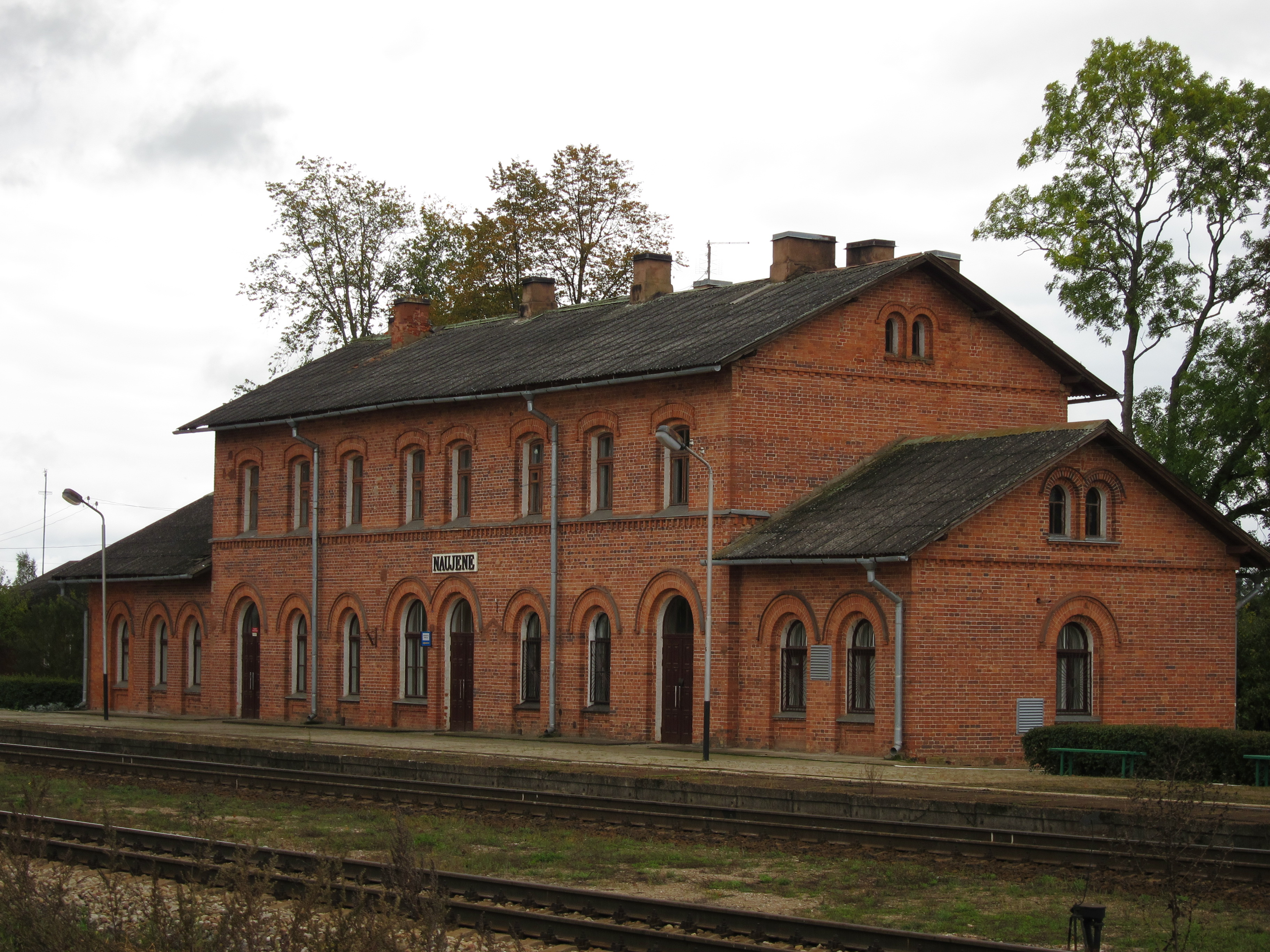 Naujenes stacijas ēka